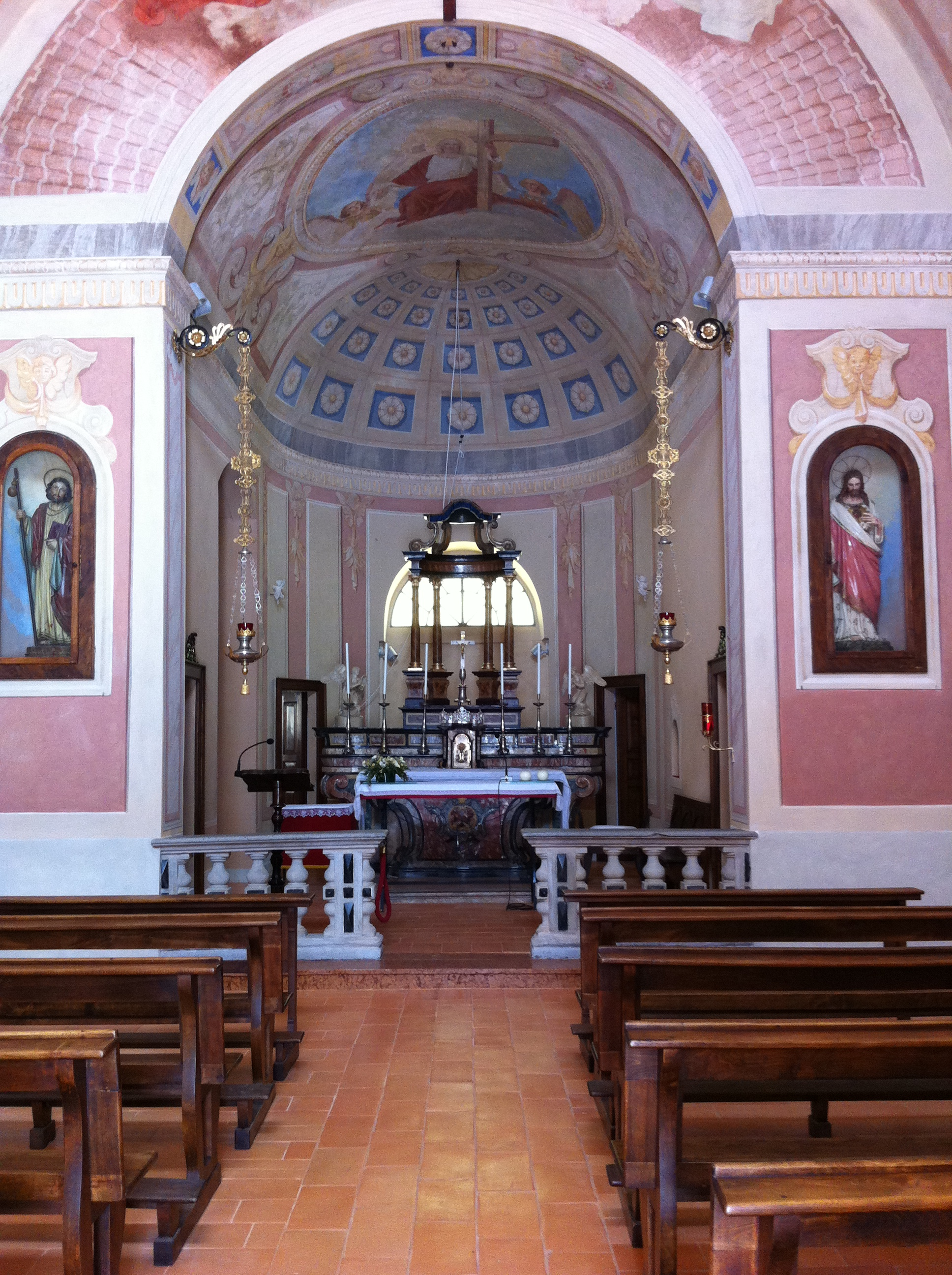 Chiesa di Santa Maria Nascente e di San Giacomo, interno, sita a Bernate in piazza Durini, risalente al XVI secolo